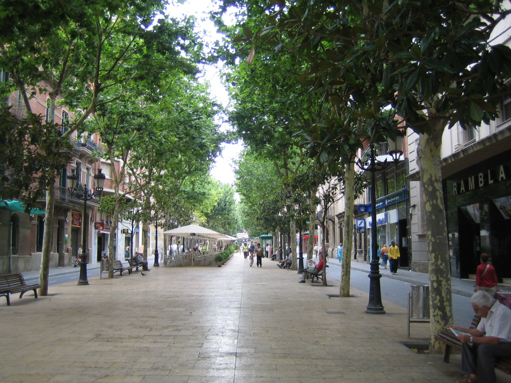 Foto hecha por mi desde la rambla justo olivieras en horizontal hacía el oeste, el viernes 08 de Julio del 2005 a las 11:04 de la mañana. Con la cámara CANON ixus 40